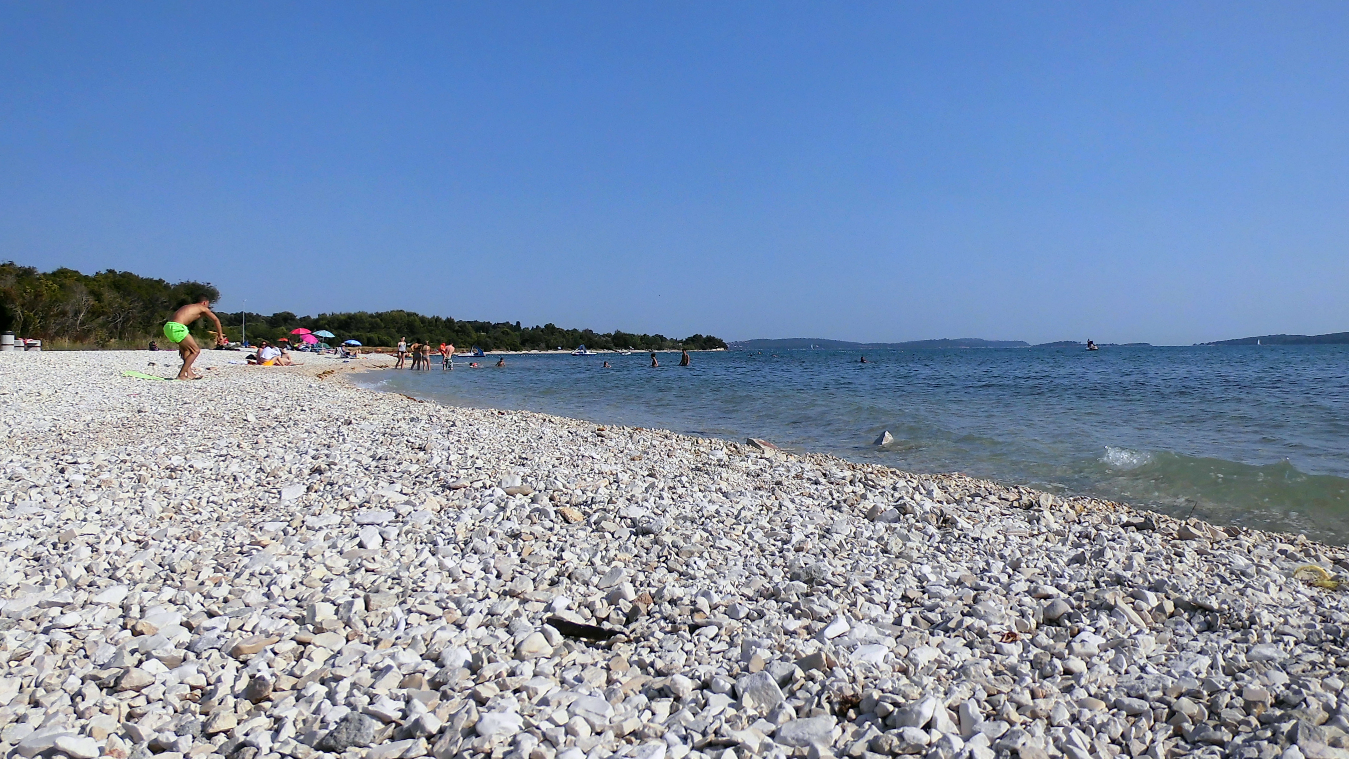 Foto des Strandes in Peroj